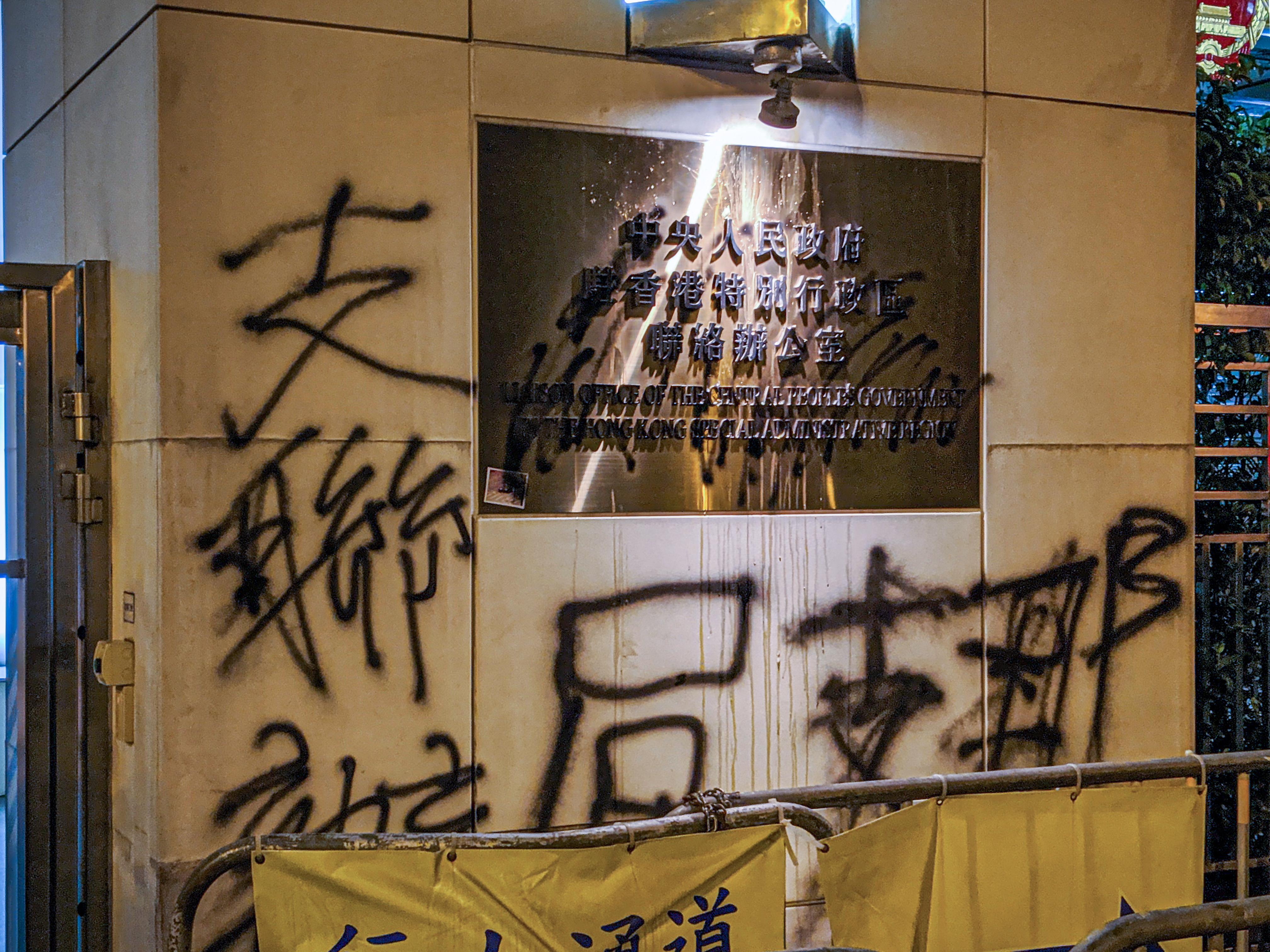 2019 Hong Kong anti-extradition law protest on 21 July 2019, captured by Studio Incendo from Flickr.